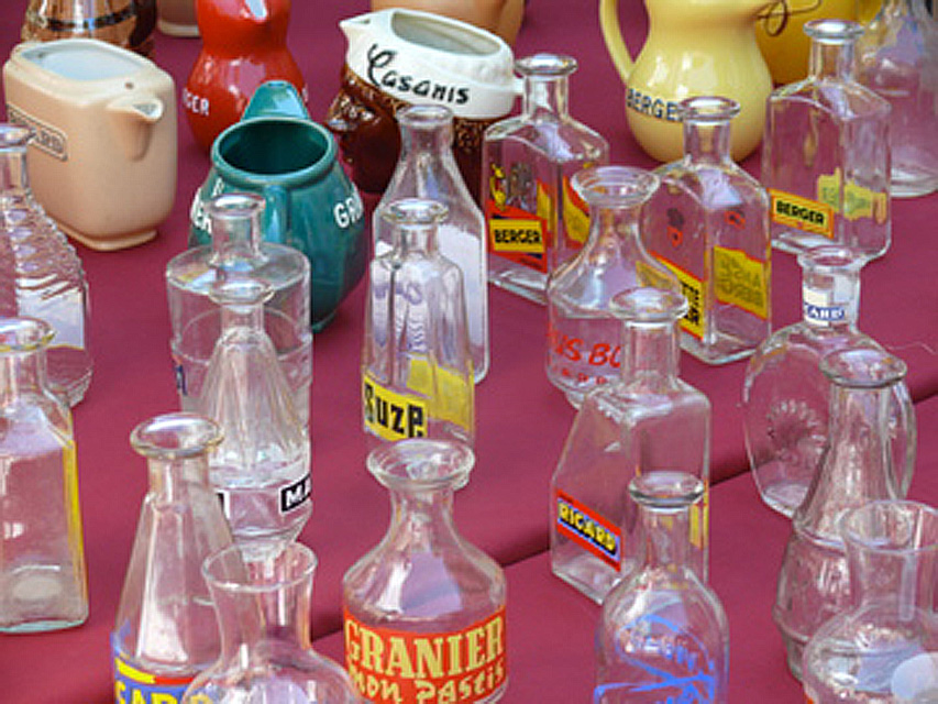 Différentes marques de pastis